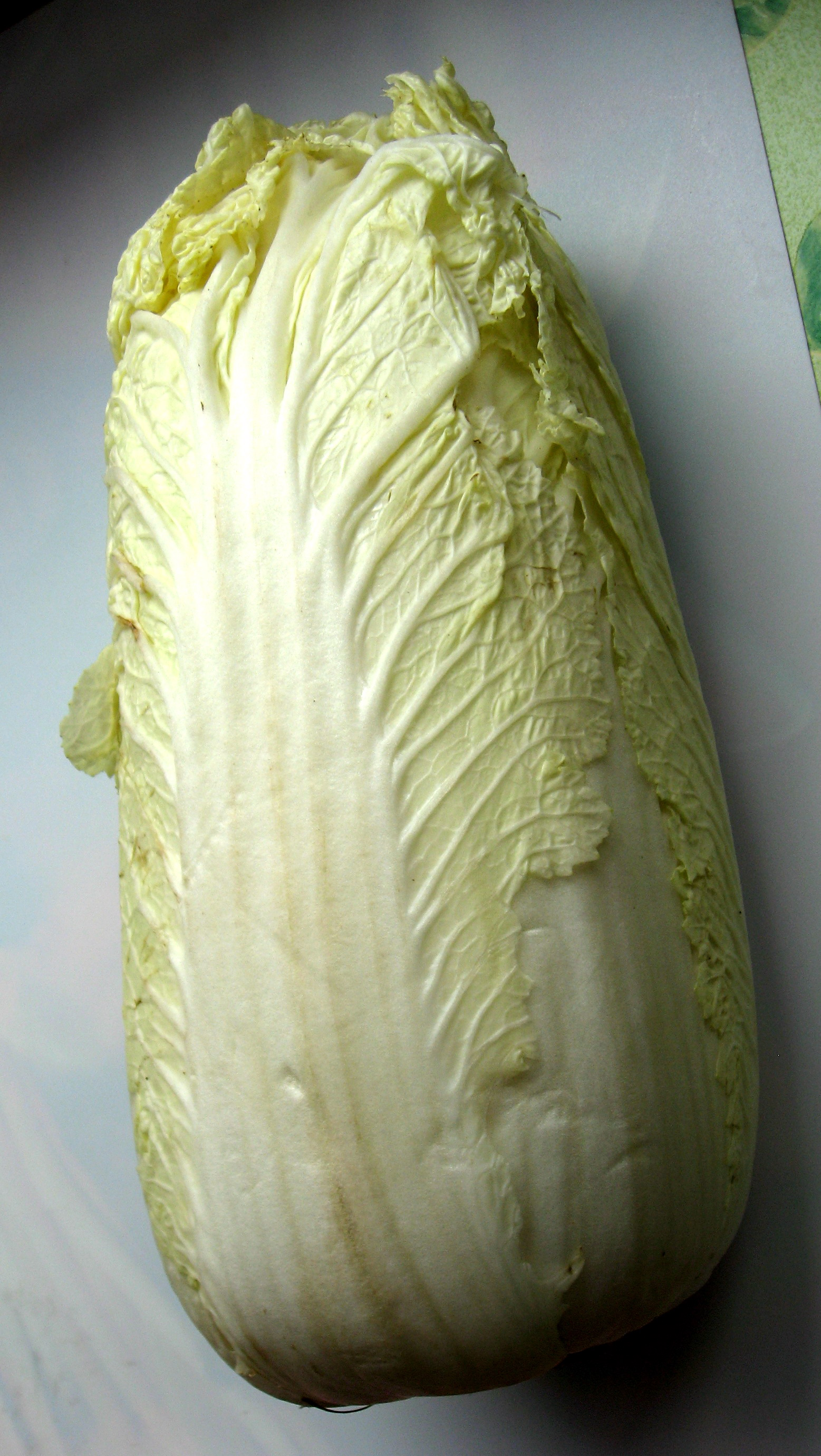 Čínské zelí